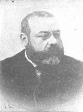 Retrato de José Feliú y Codina, fotografía de Manuel Compañy recogida en la revista española Nuevo Mundo.